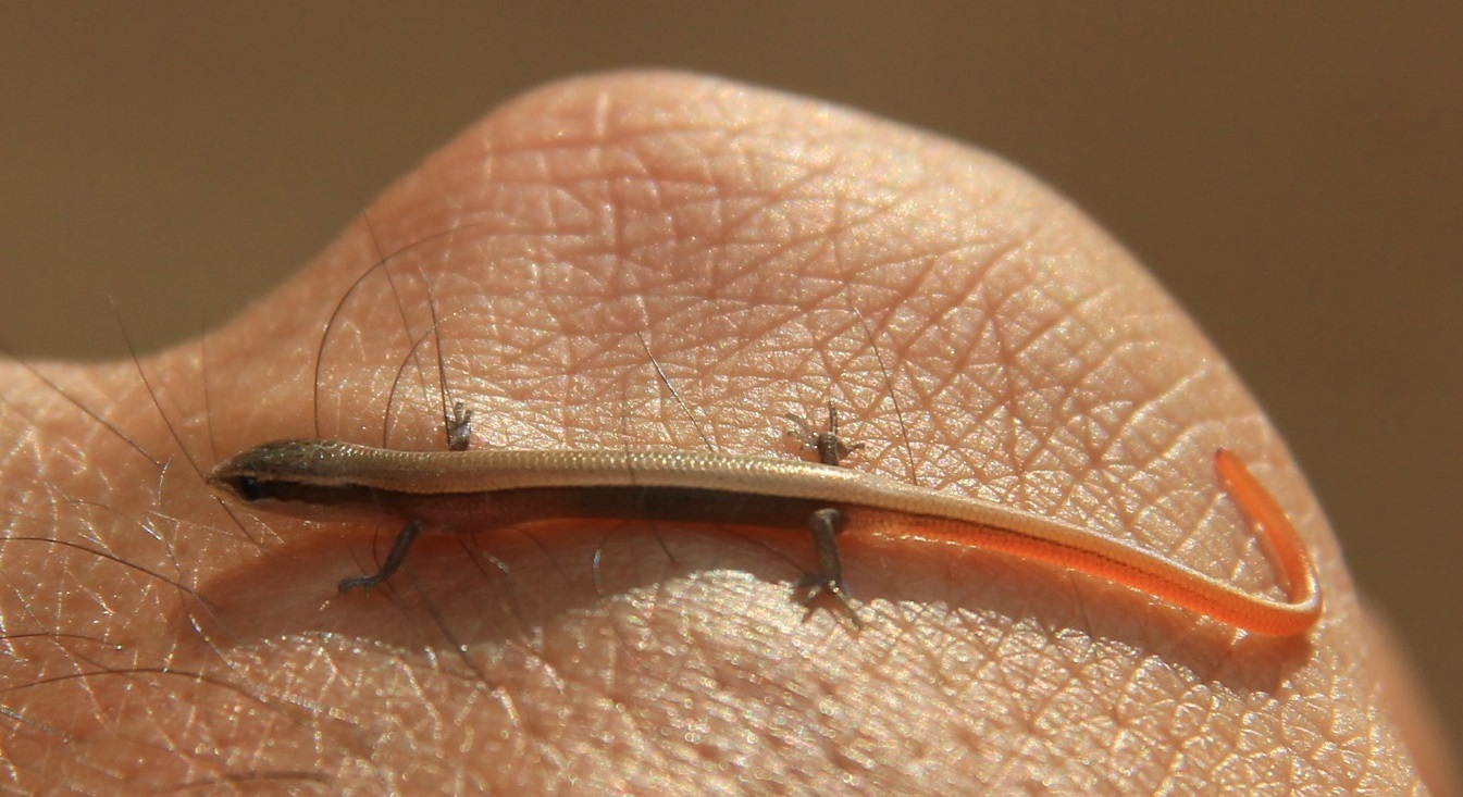 חומט גמד (צעיר), הרי יהודה 2014